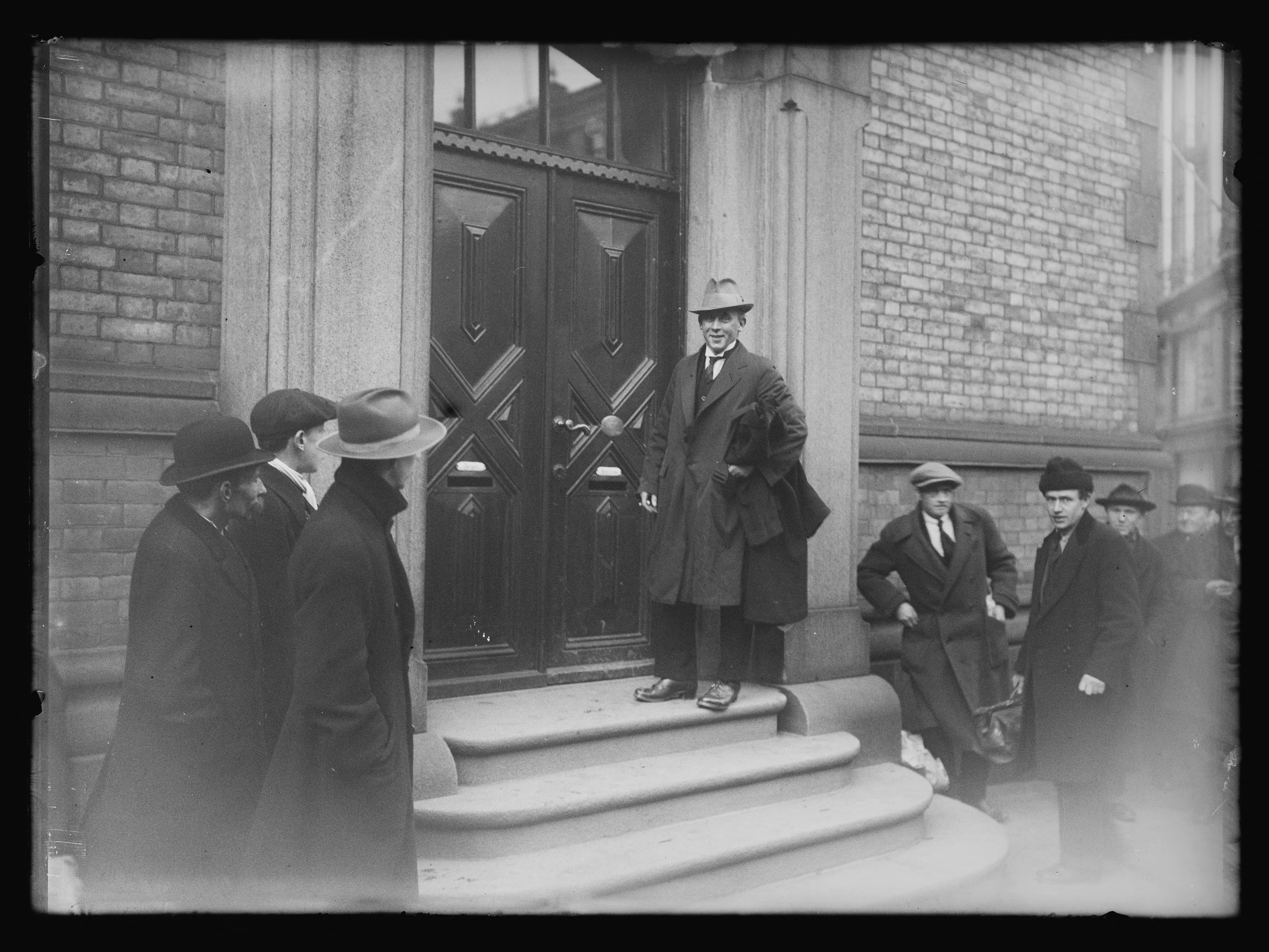 Bildet er hentet fra Nasjonalbibliotekets bildesamling. Anmerkninger til bildet var: Påskrift arkivark: Olsen - Hagen paa Stortingstrappen Arkivnummer: 510 Oslo, Oslo, Oslo